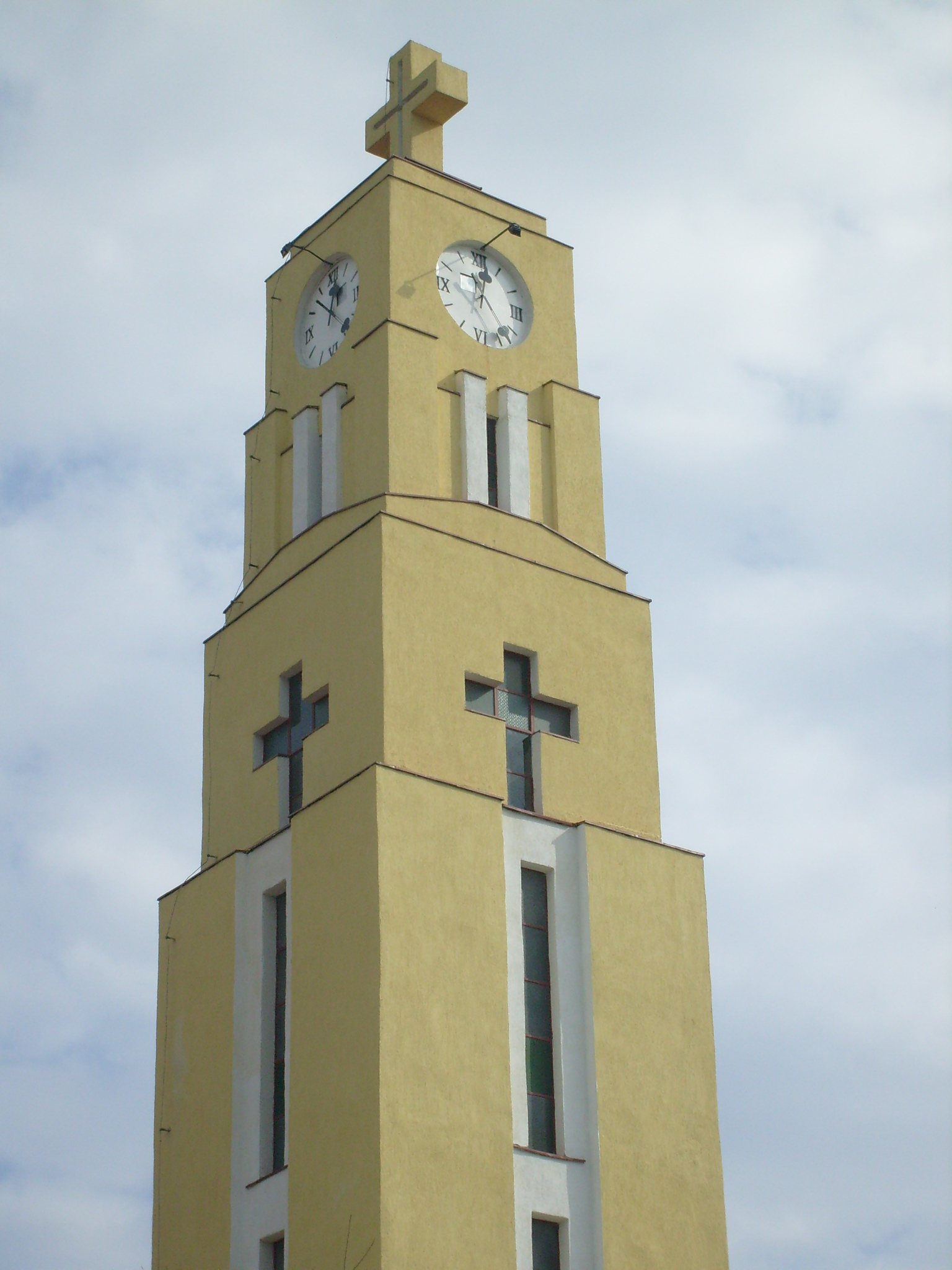 Biserica Iuliu Hossu din Cluj. Turnul.